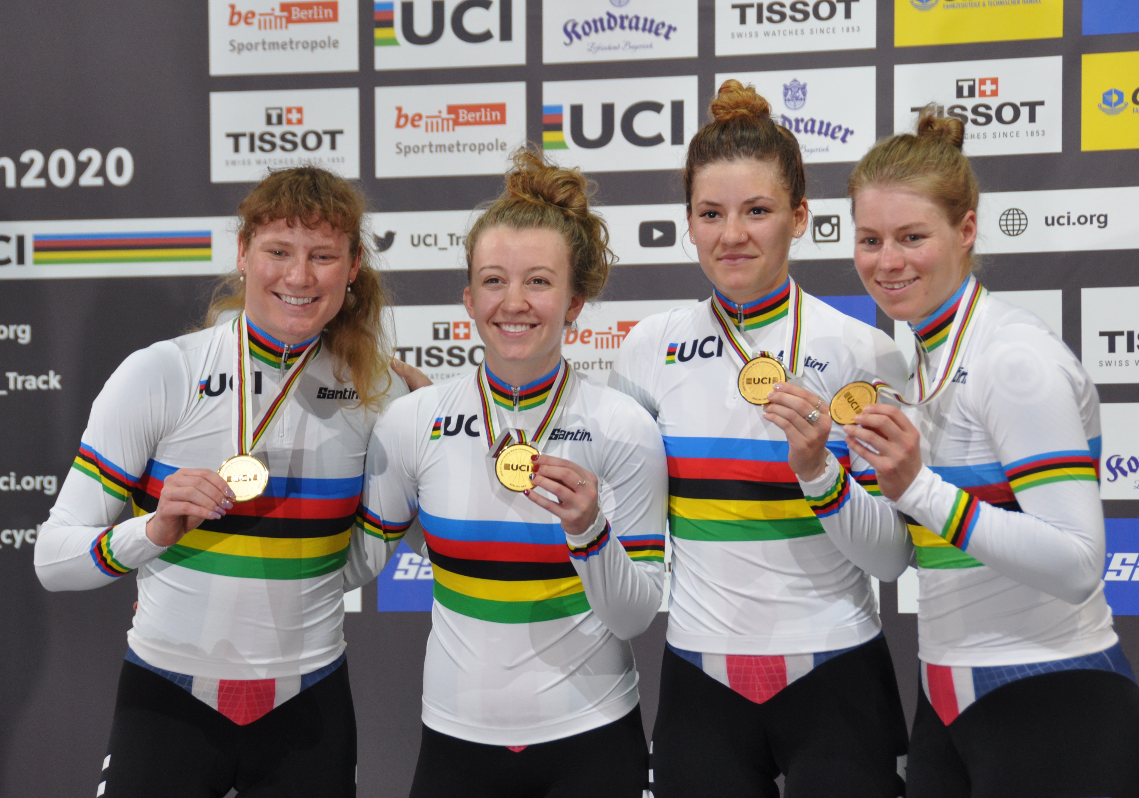 US-amerikanischer Vierer der Frauen - Gold in der Mannschaftsverfolgung, v.l.n.r.: Lily Williams, Emma White, Chloé Dygert, Jennifer Valente